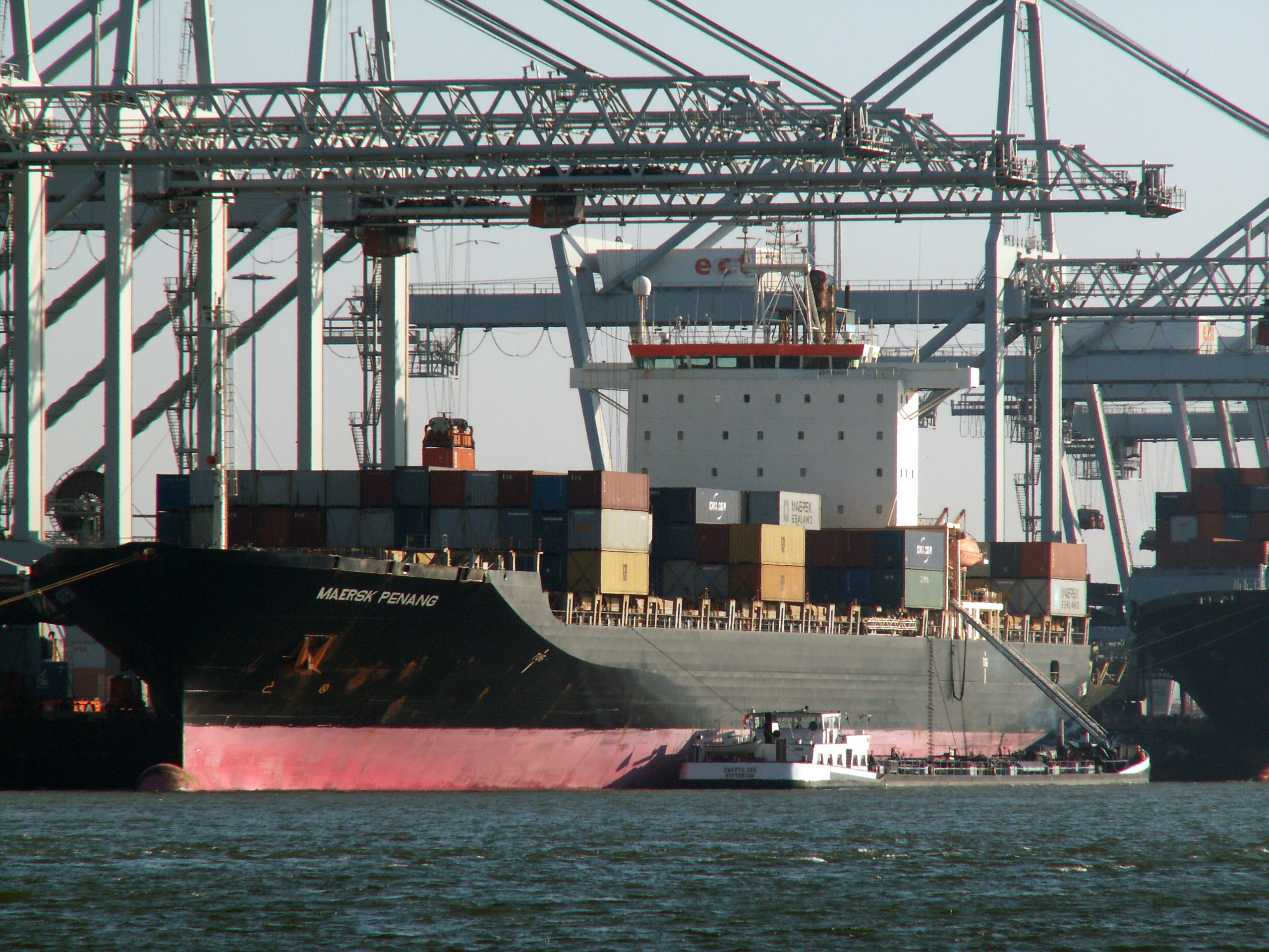 Maersk Penang Port of Rotterdam 25-Feb-2006.